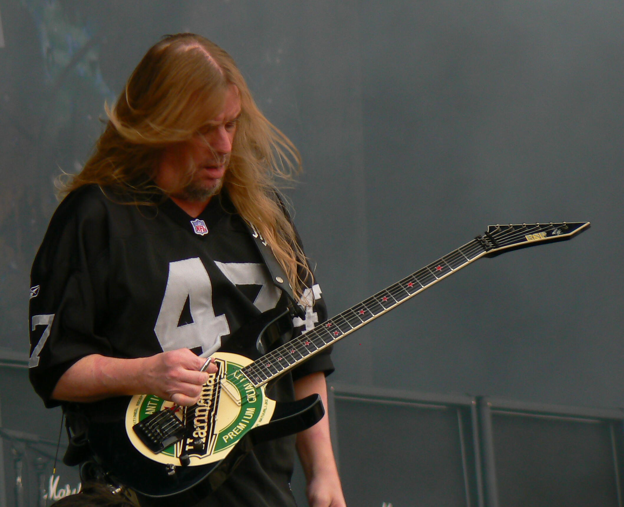 Jeff Hanneman live